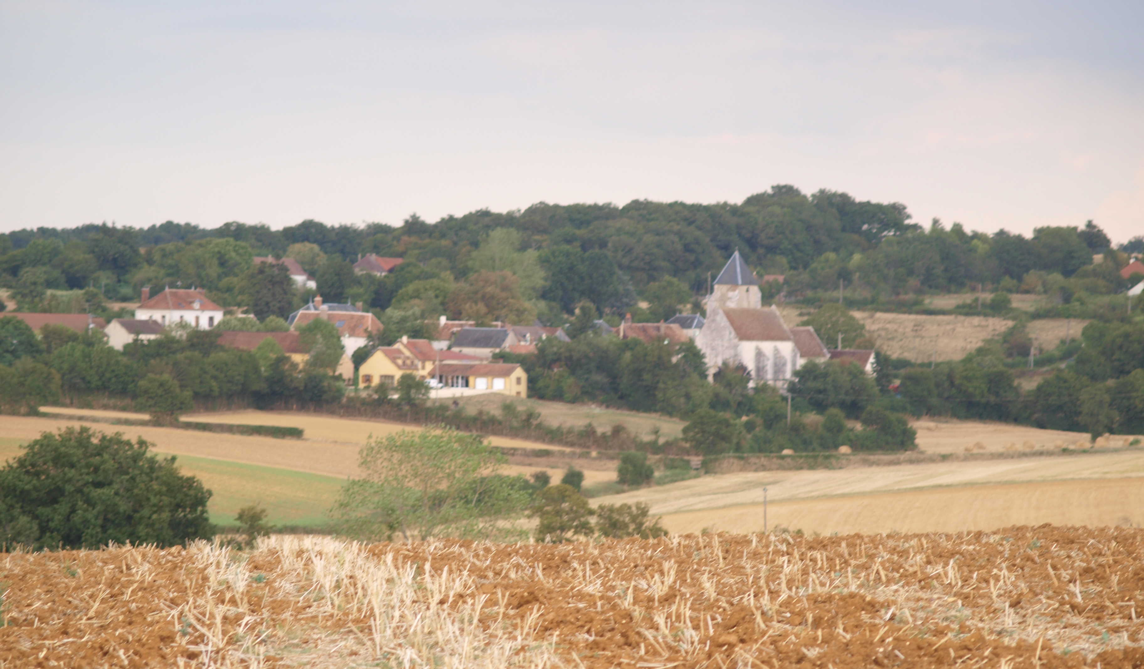 Lévis (Yonne) - le village